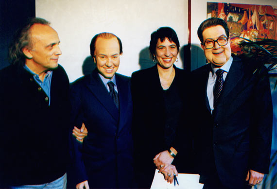 Foto con Romano Prodi e Silvio Berlusconi, imitati rispettivamente da Corrado e Sabina Guzzanti. Nel mezzo dei due, Serena Dandini